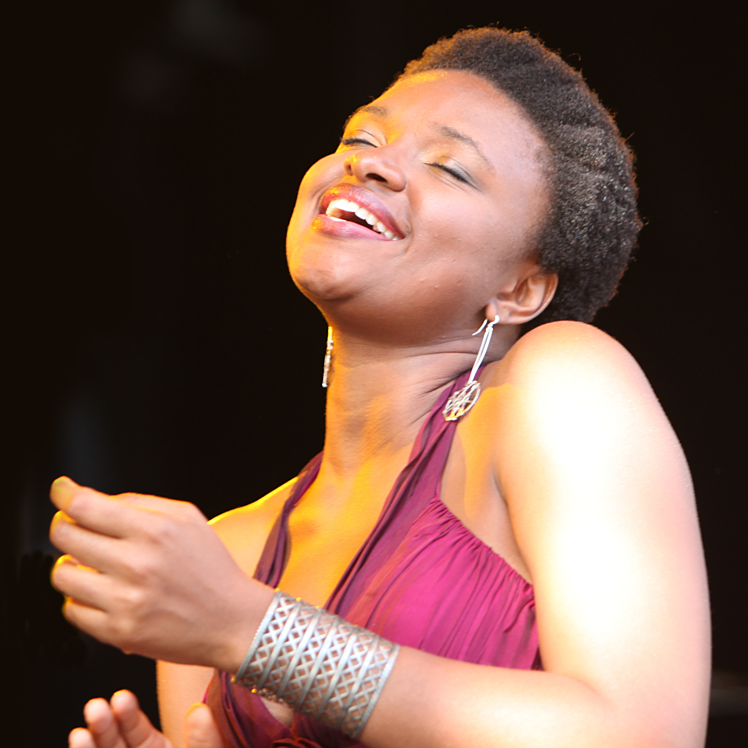 Lizz Wright at Stockholm Jazz Fest 2009